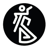 Eins der beiden aktuellen Bandlogos der amerikanischen Hardcore-Punk-Band "Turnstile".